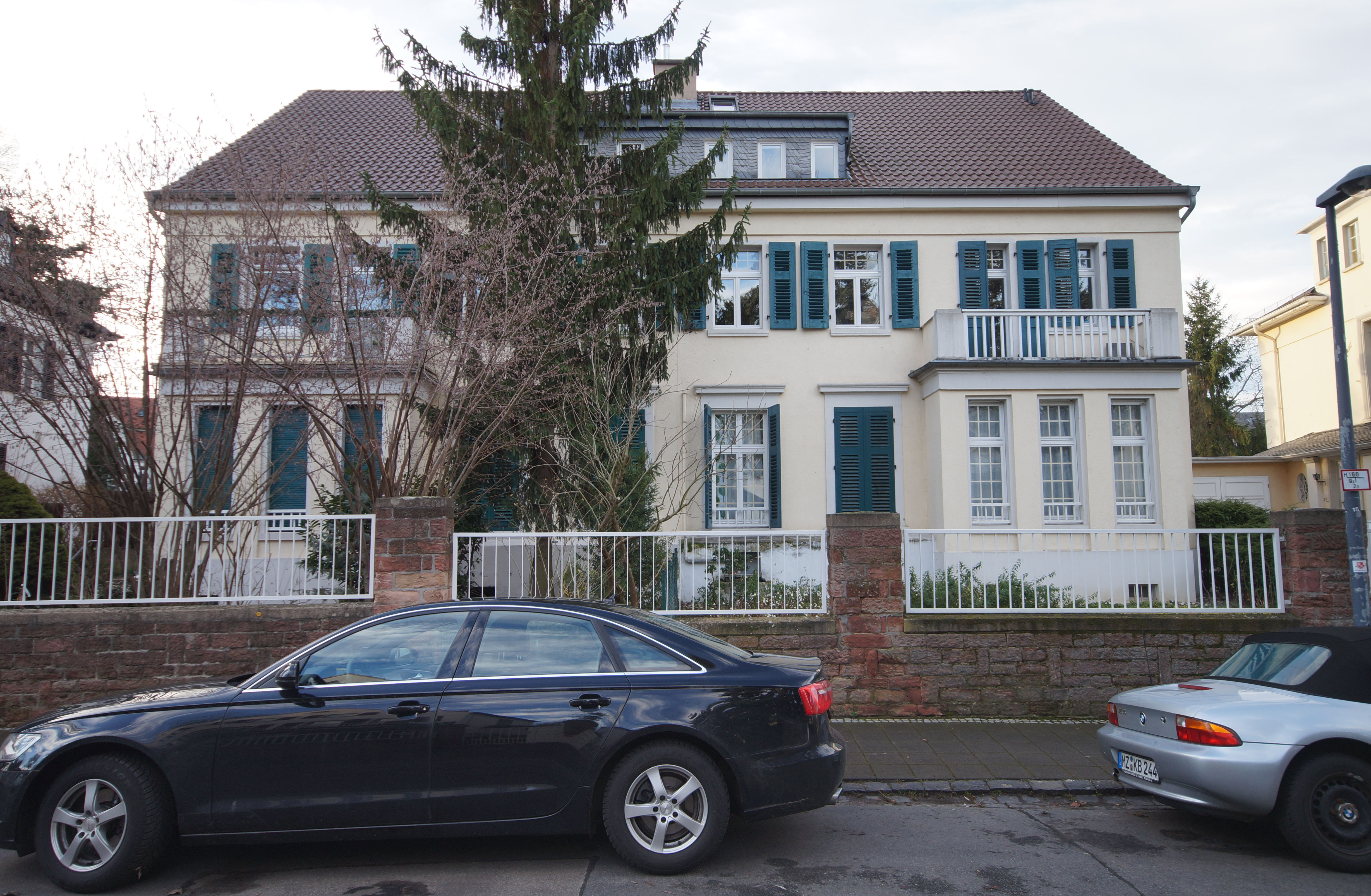 Die Fassade des Doppelhauses Am Klostergarten 5/7 in Mainz-Oberstadt